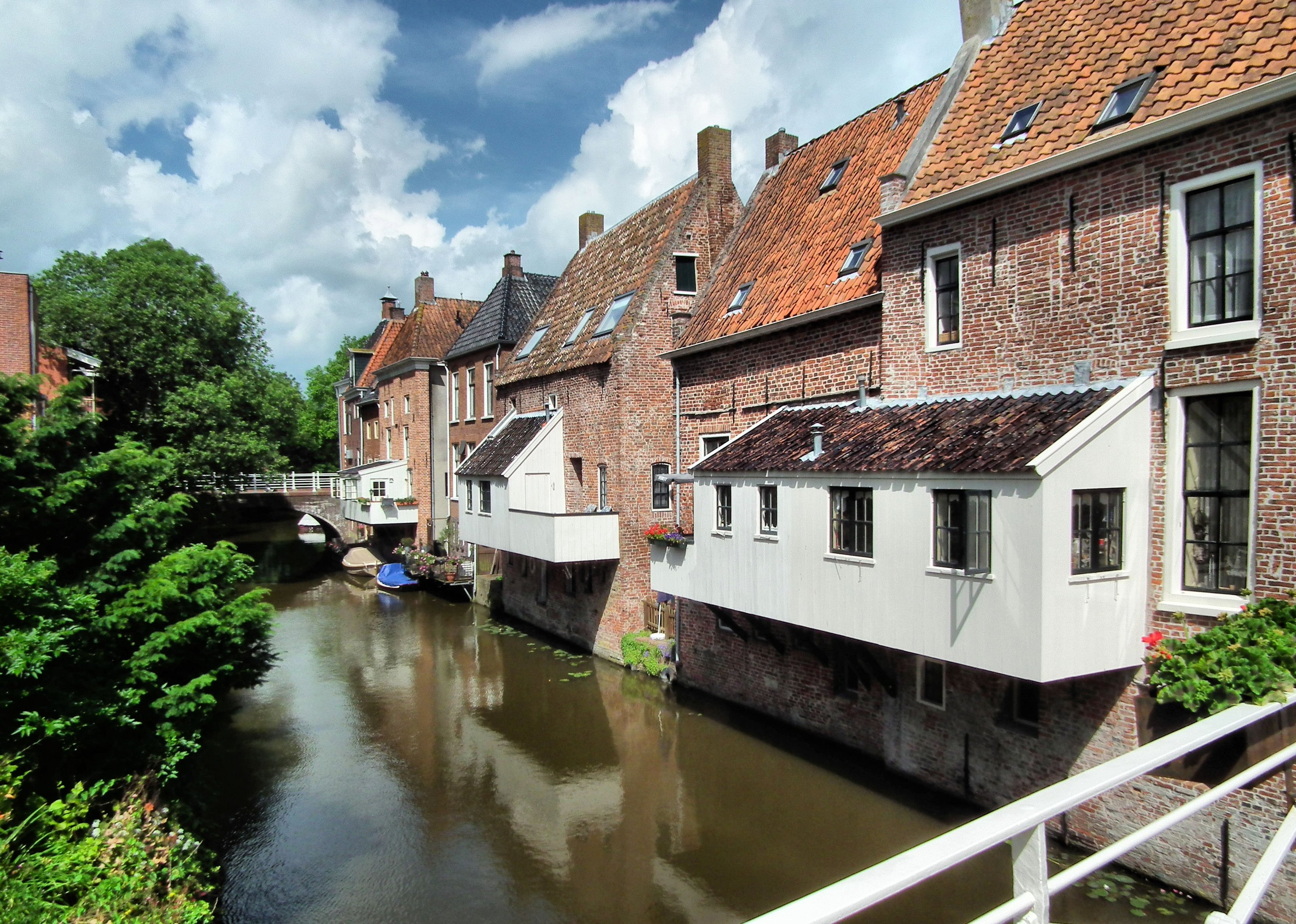 Het historische centrum van Appingedam (NL) - Damsterdiep